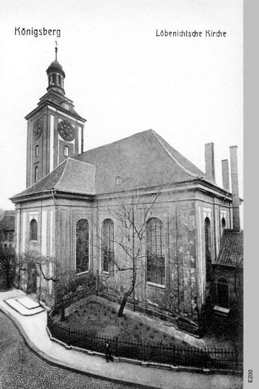 Die Löbenichter Kirche in Königsberg